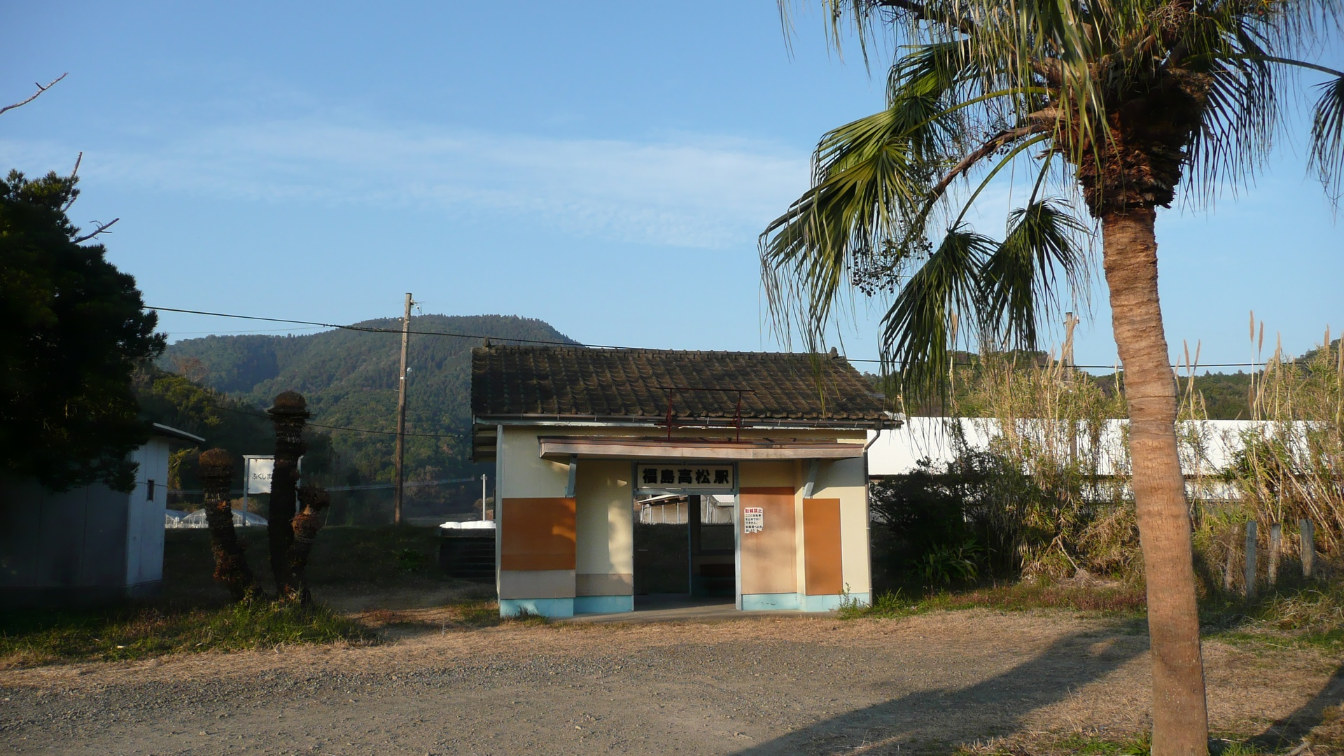 2008/1/6 福島高松駅（日南線、宮崎県串間市） 撮影後リサイズ&ノイズ処理。 撮影&投稿者:Sanjo